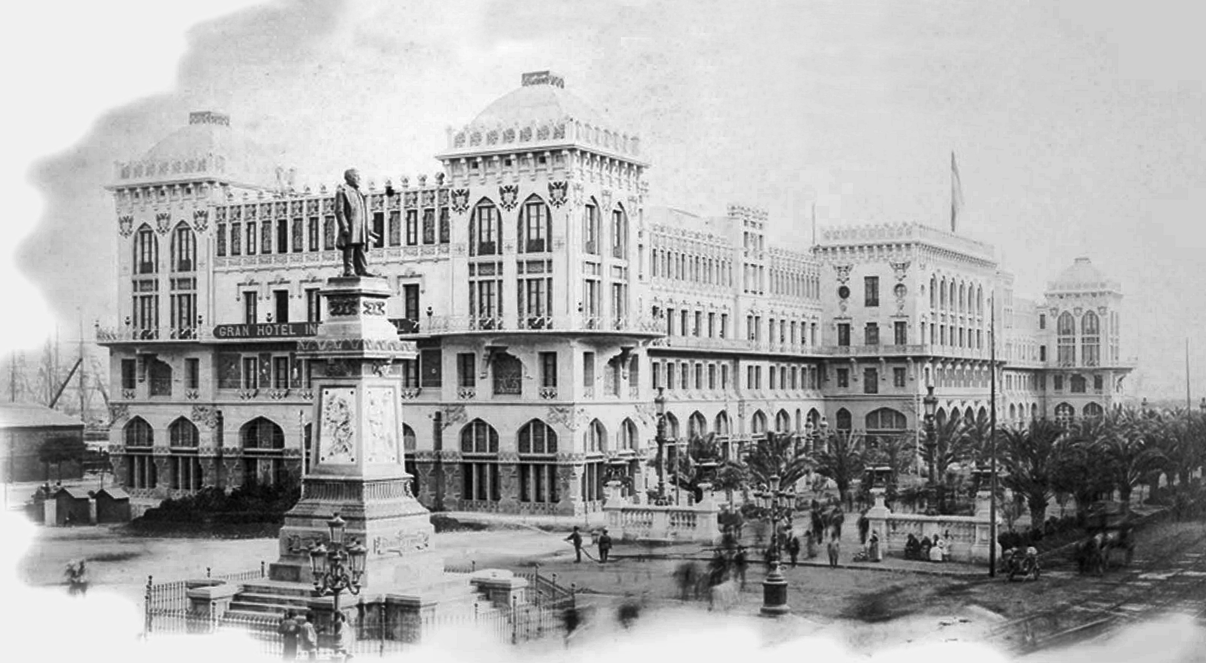 Gran Hotel Internacional. (In etwa) übersetzte Originalbeschreibung aus der Quelle: „In unserer Sammlung von fotografischen Dokumenten befindet sich dieses 27×39,5 cm große Bild eines unbekannten Fotografen.“